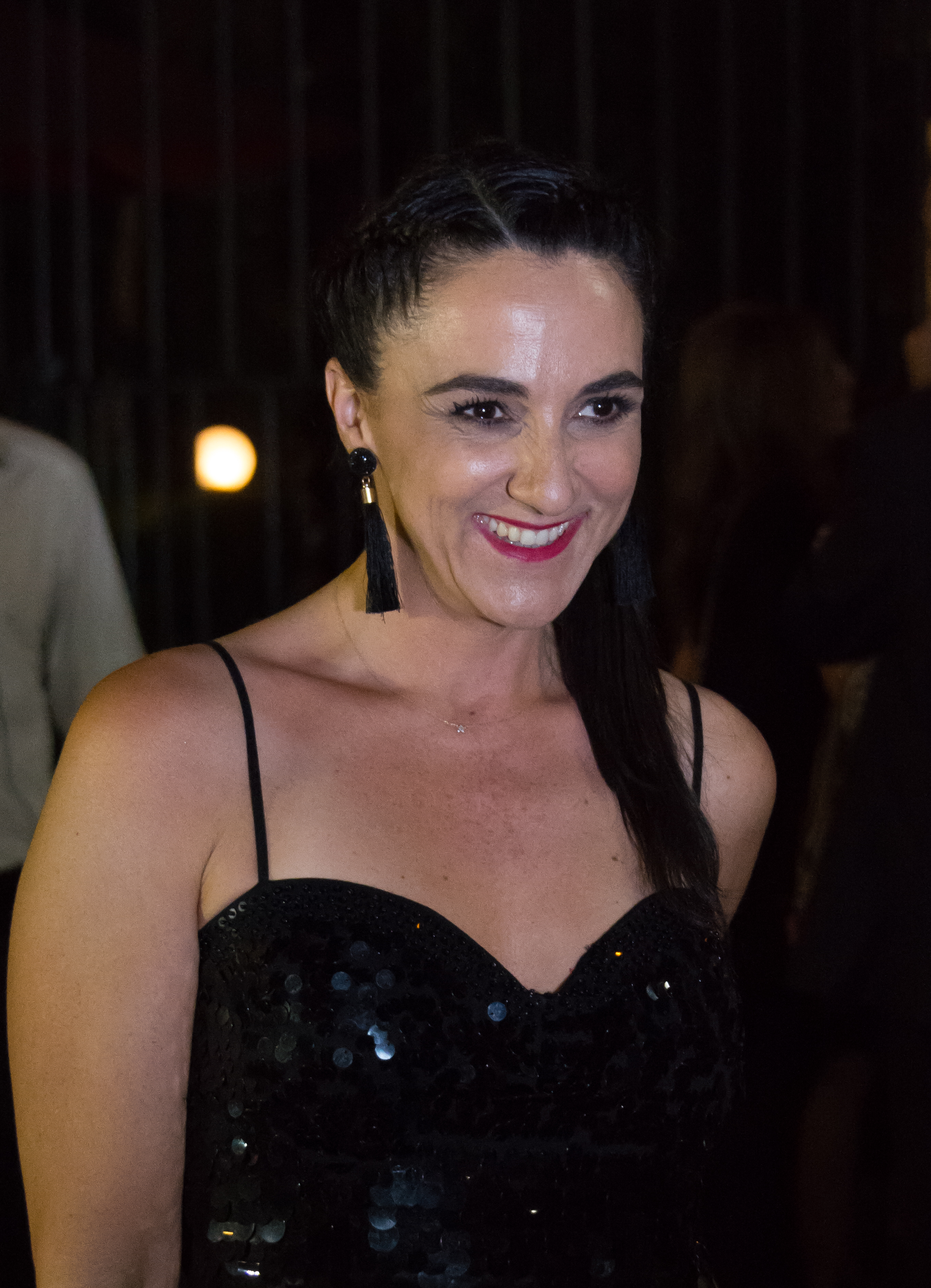 Renata Bravo, Premios Caleuche, Teatro Oriente, Providencia, Santiago, Región Metropolitana de Santiago, Chile.